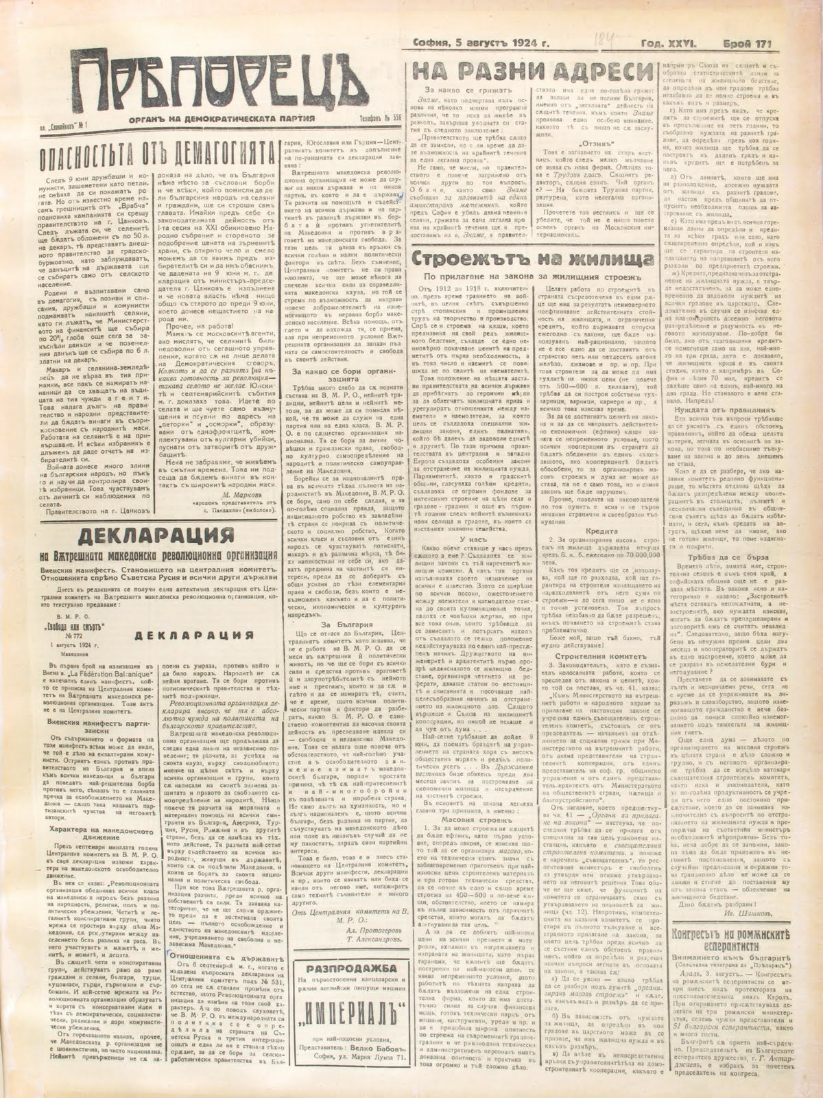 Вестник "Пряпорец" с декларация на ВМРО по повод Майския манифест.